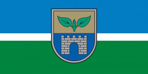 Salaspils novada karogs